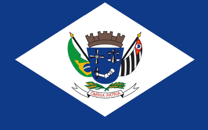 Bandeira de Álvares Machado - SP.